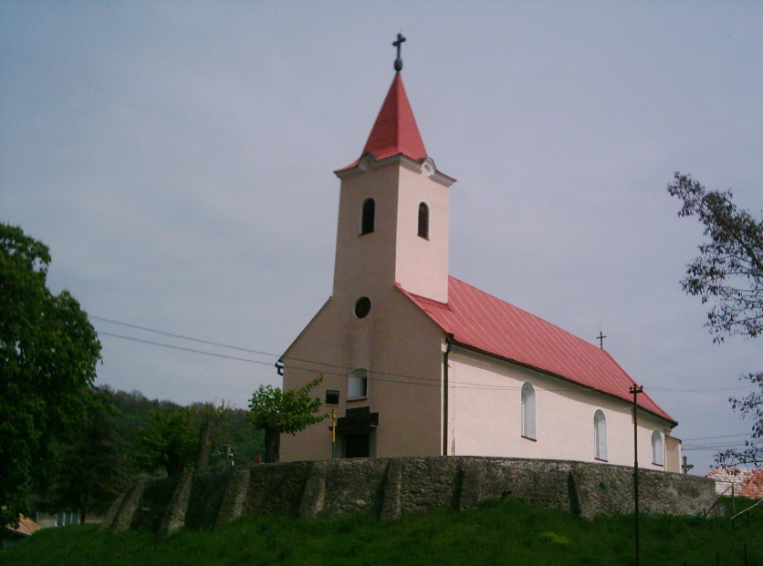 Dacsókeszi, Szlovákia-XVI. sz. katolikus temlom